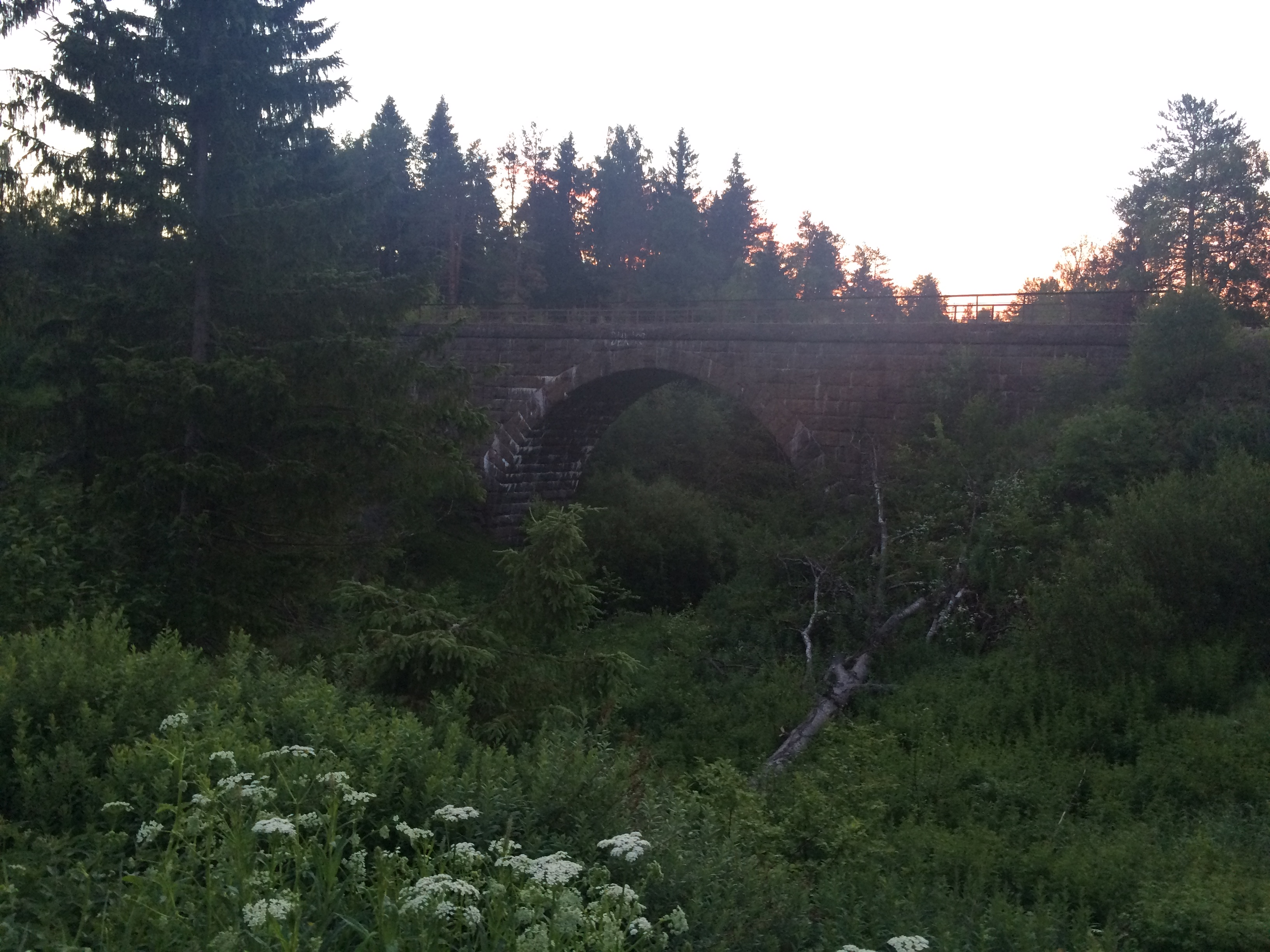 Мост Харлу